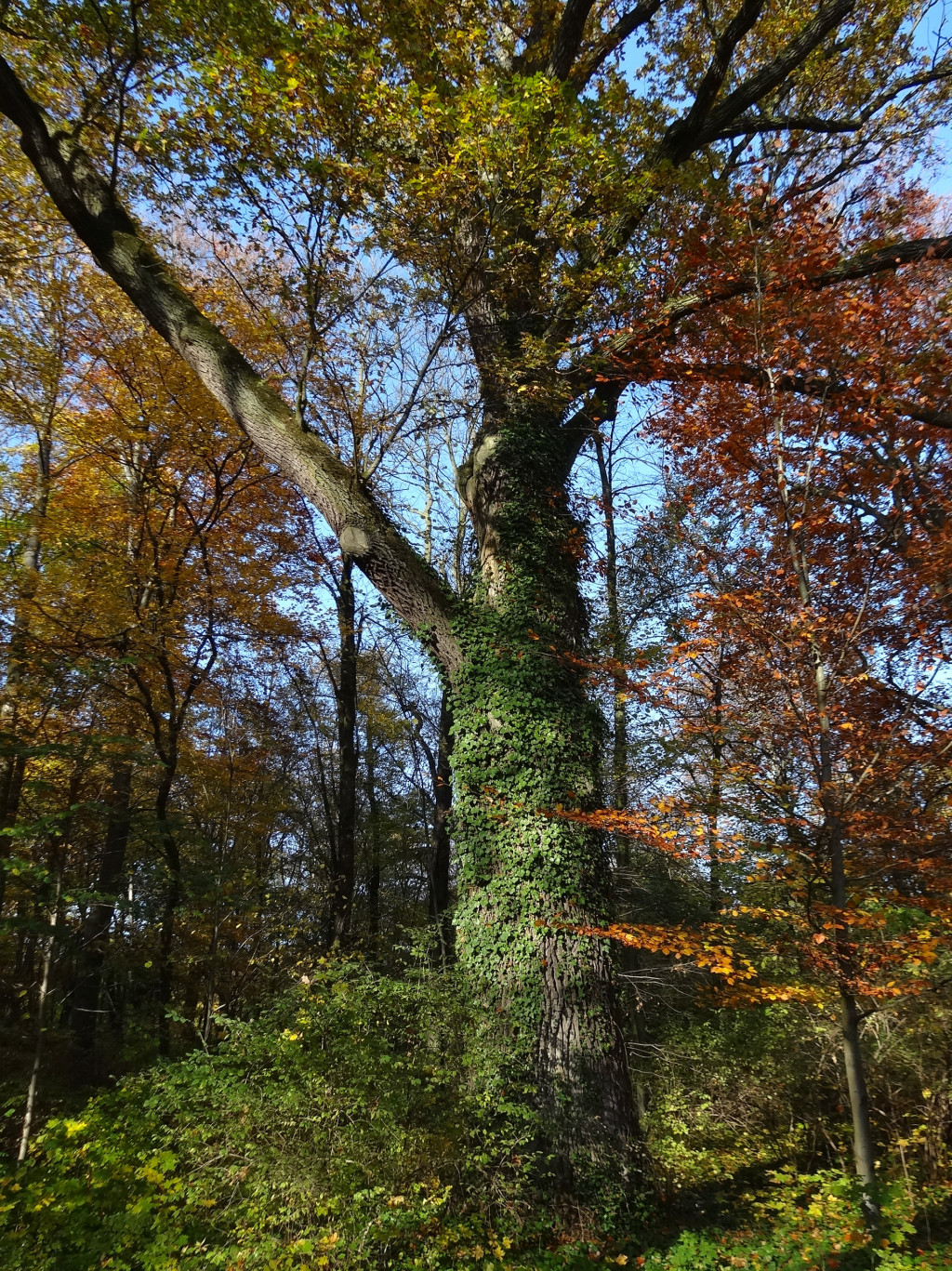 Zespół pałacowo-parkowy w Ostromecku k. Bydgoszczy - bluszcz na drzewach w części górnej na skarpie Doliny Dolnej Wisły